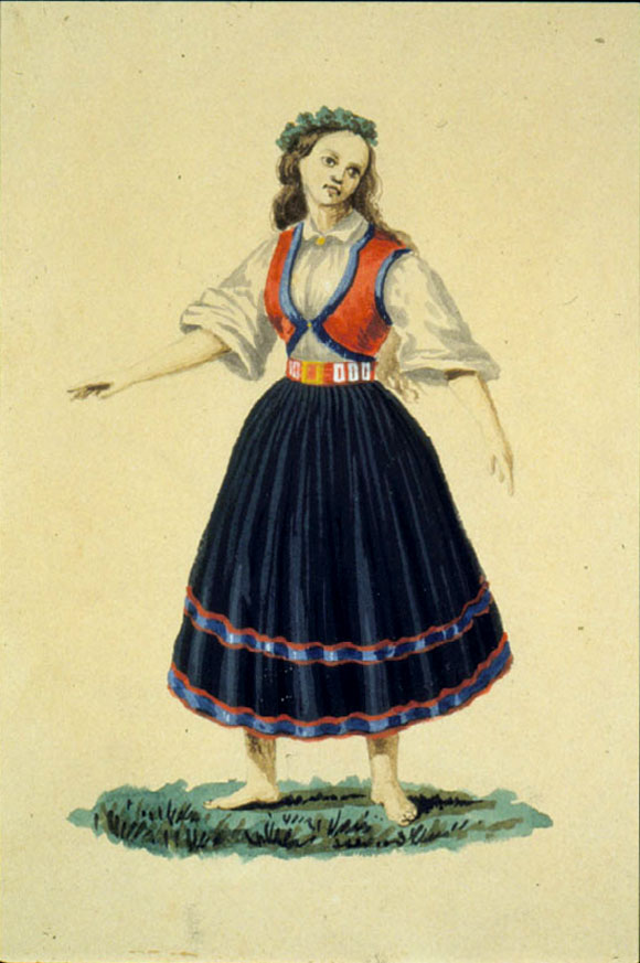 Alfhild i Olaf Liljekrans